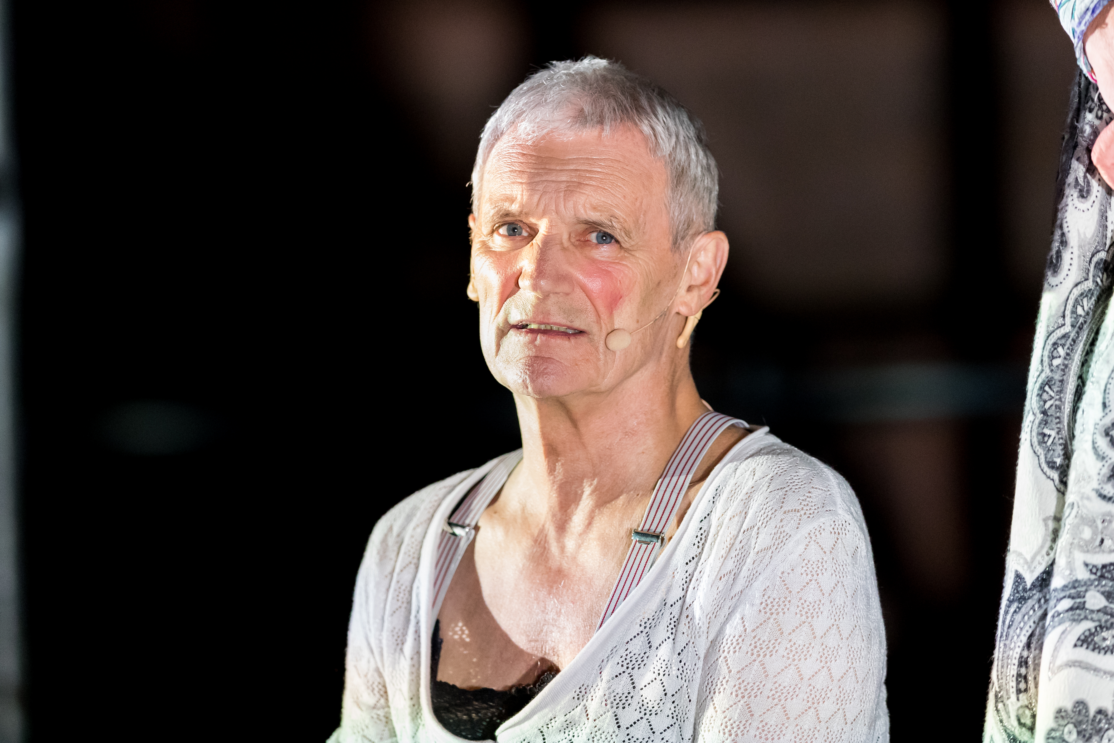 Winfried Küppers during Nibelungenfestspiele ( at Worms, Rheinland-Pfalz, Germany on 2019-07-10, Photo: Sven Mandel